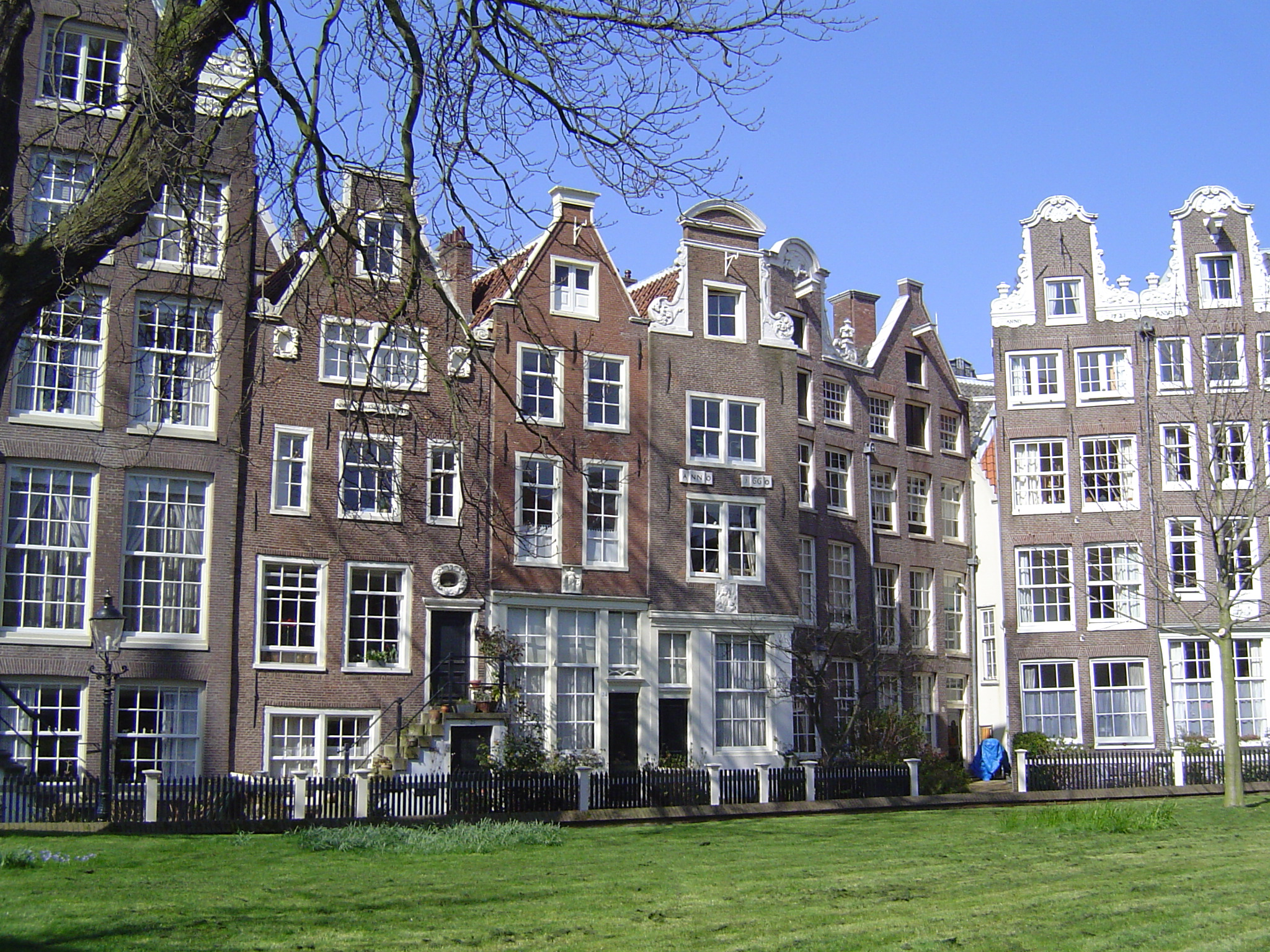 Typische Häuserzeile in Amsterdam This is an image of rijksmonument number 358 This is an image of rijksmonument number 359